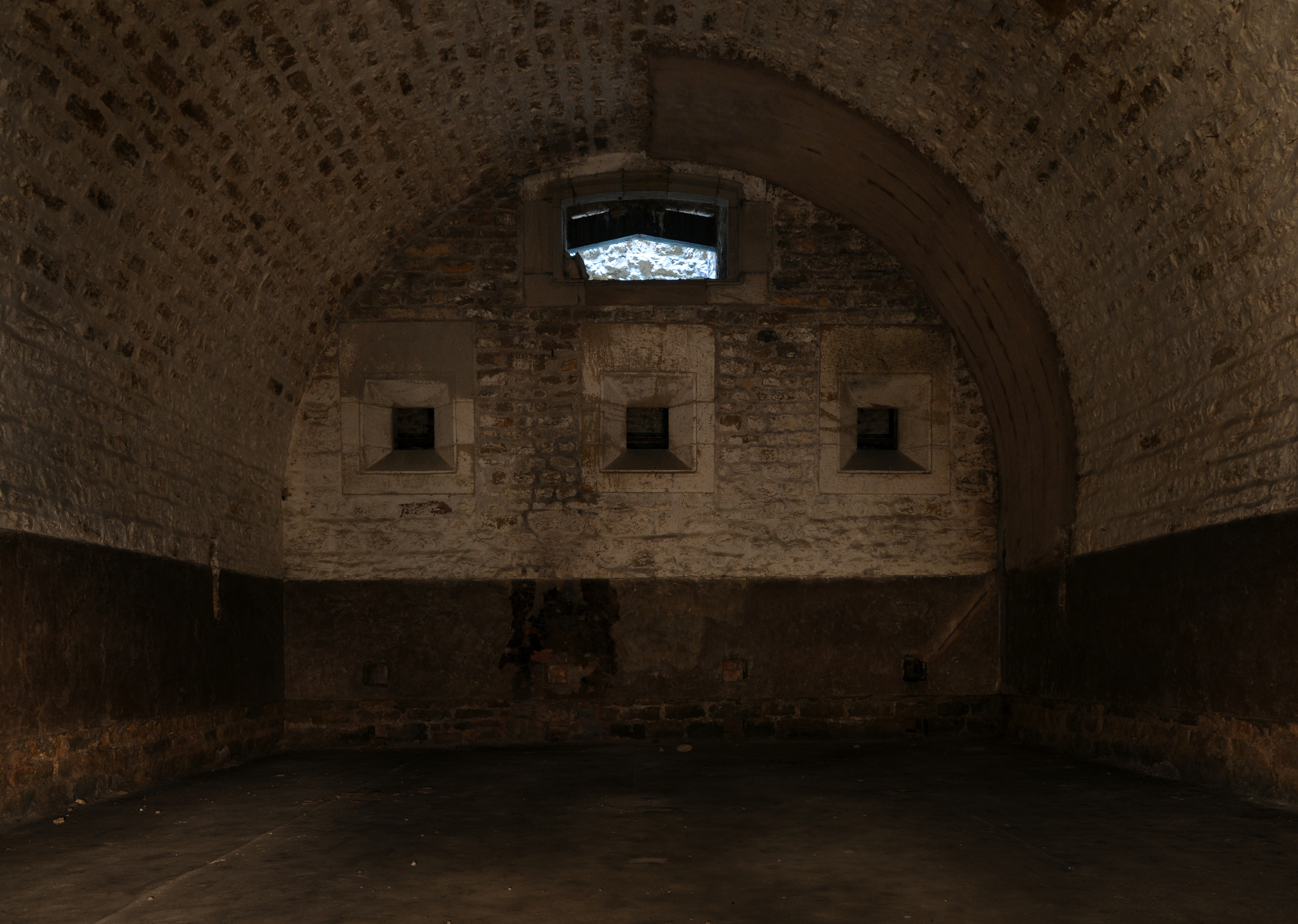 Fort des Basses Perches : un des deux magasins à poudre. Basses perches fortifications.